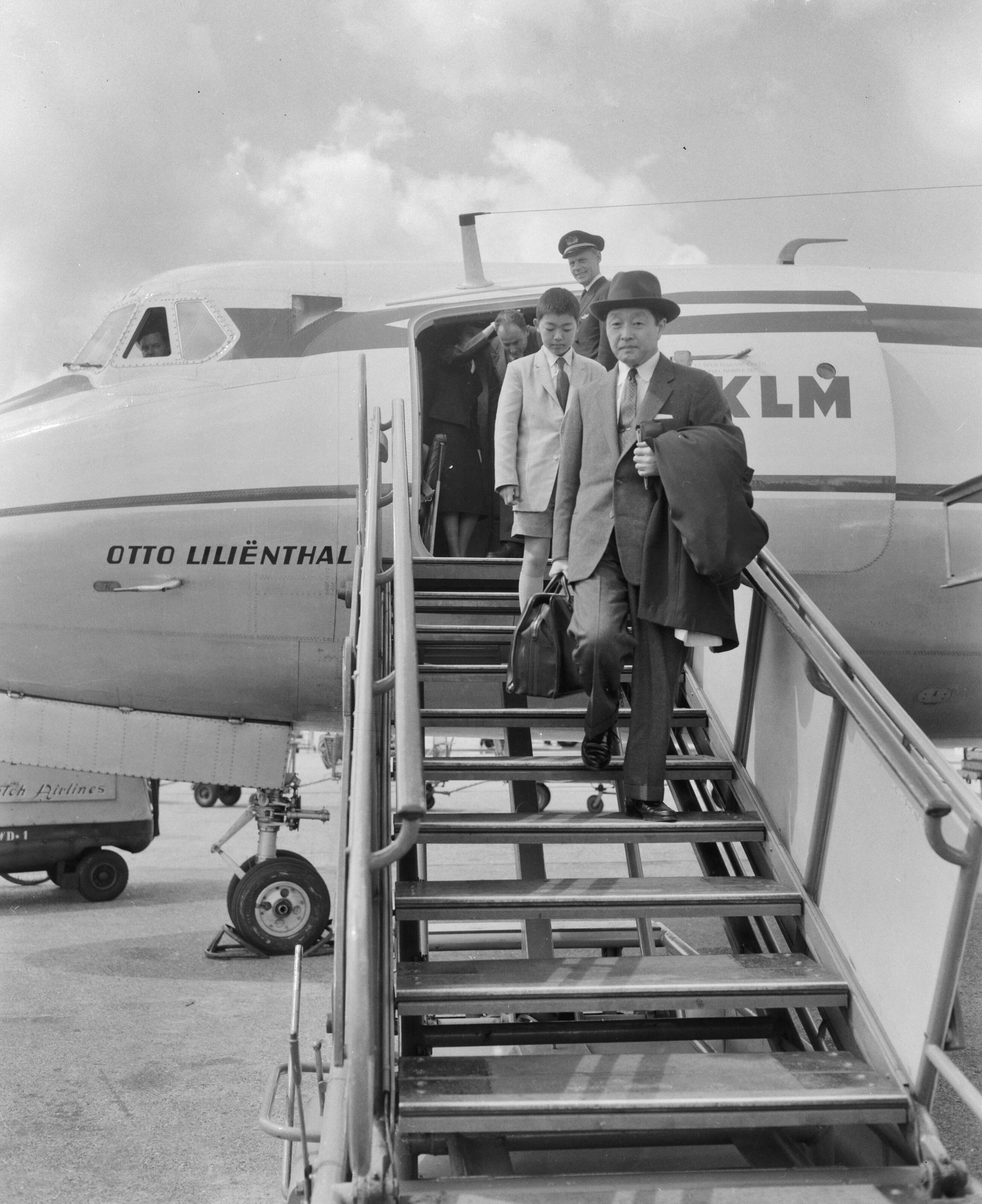 Collectie / Archief : Fotocollectie Anefo Reportage / Serie : [ onbekend ] Beschrijving : Aankomst nieuwe Japanse ambassadeur Zijne Excellentie Akina Miyazaki op Schiphol, ambassadeu verlaat het vliegtuig Datum : 11 juni 1959 Locatie : Schiphol Trefwoorden : aankomst en vertrek, diplomaten, vliegvelden Fotograaf : Bilsen, Joop van / Anefo Auteursrechthebbende : Nationaal Archief Materiaalsoort : Negatief (zwart/wit) Nummer archiefinventaris : bekijk toegang 2.24.01.04 Bestanddeelnummer : 910-4345